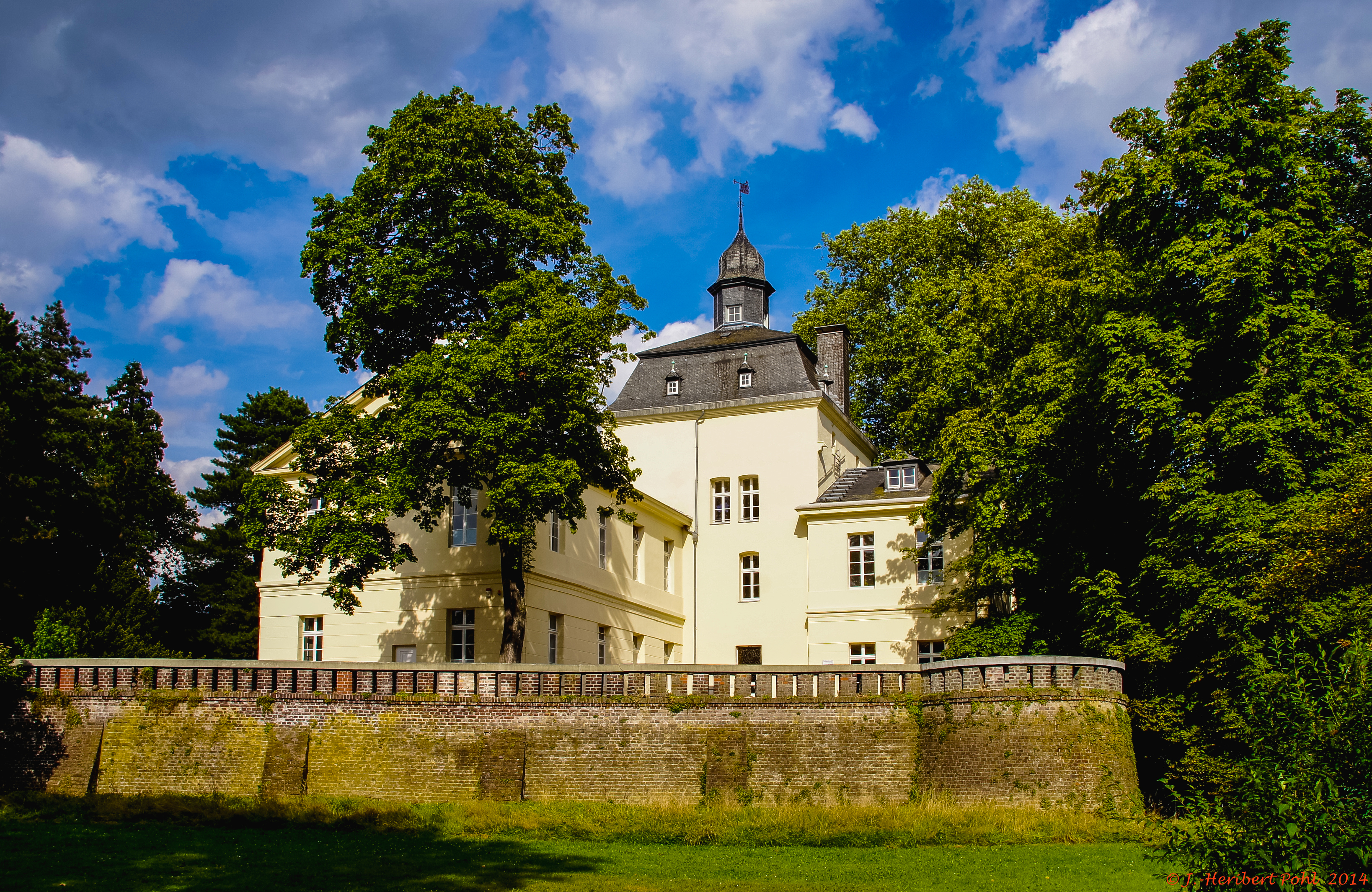 Mittelalterliche Wasserburg, die im neunzehnten Jahrhundert durch Luise Prinzessin von Preußen zum Schloss mit englischen Park umgestalltet